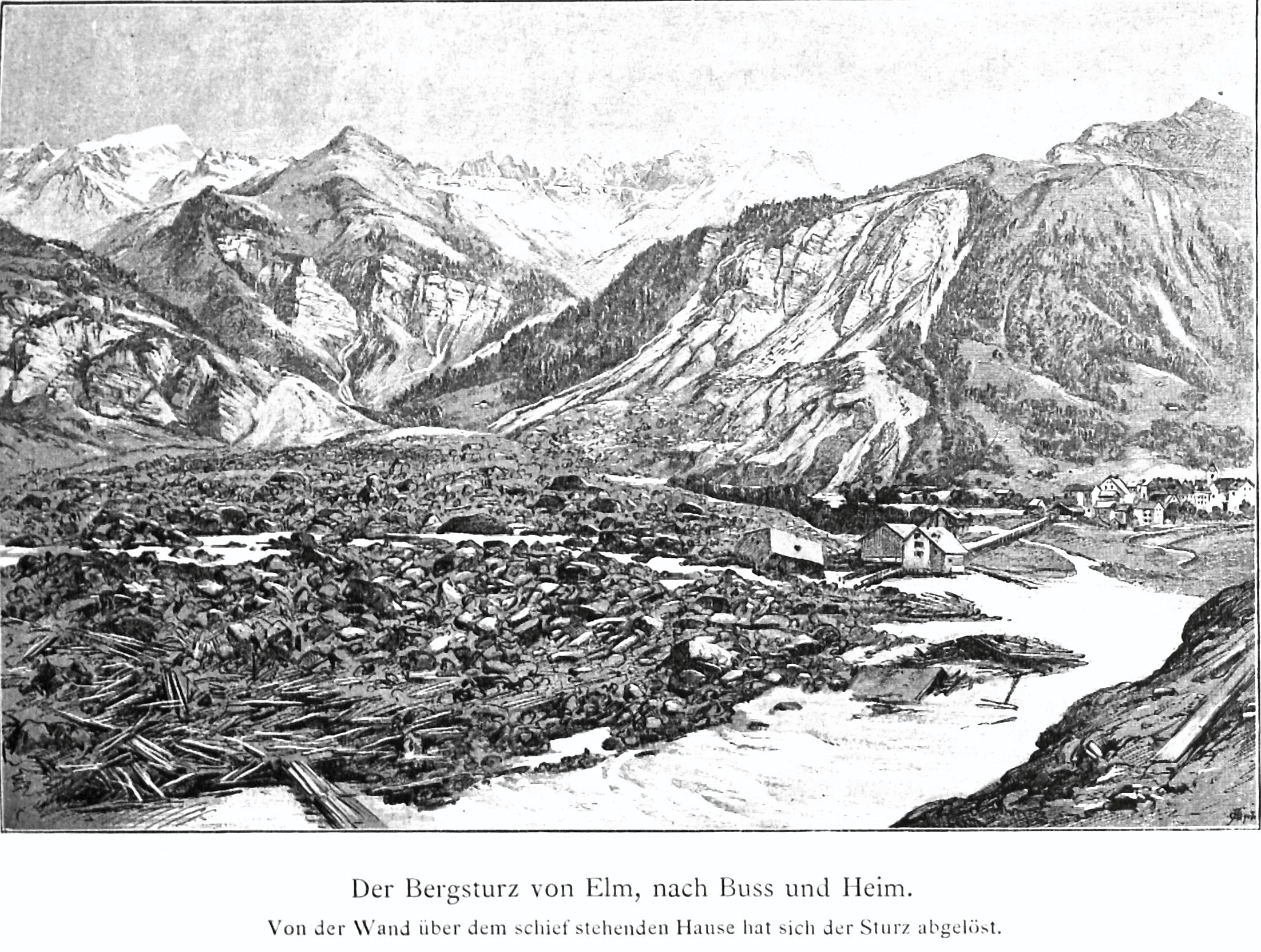 Der Bergsturz von Elm nach Buss und Heim aus Zeitschrift des Deutschen und Oesterreichischen Alpenvereins 1889 Band 20